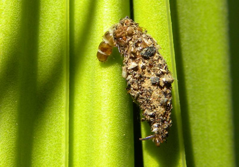 Diplodoma laichartingella, caterpillar and case